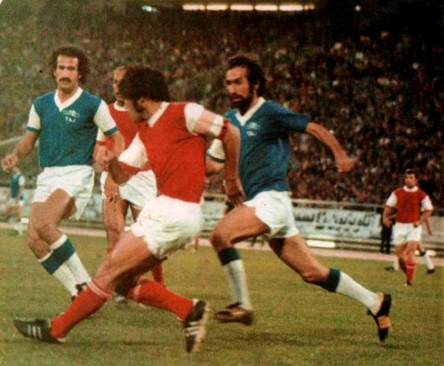 دیدار پرسپولیس تاج در ورزشگاه آریامهر در دهه پنجاه خورشیدی